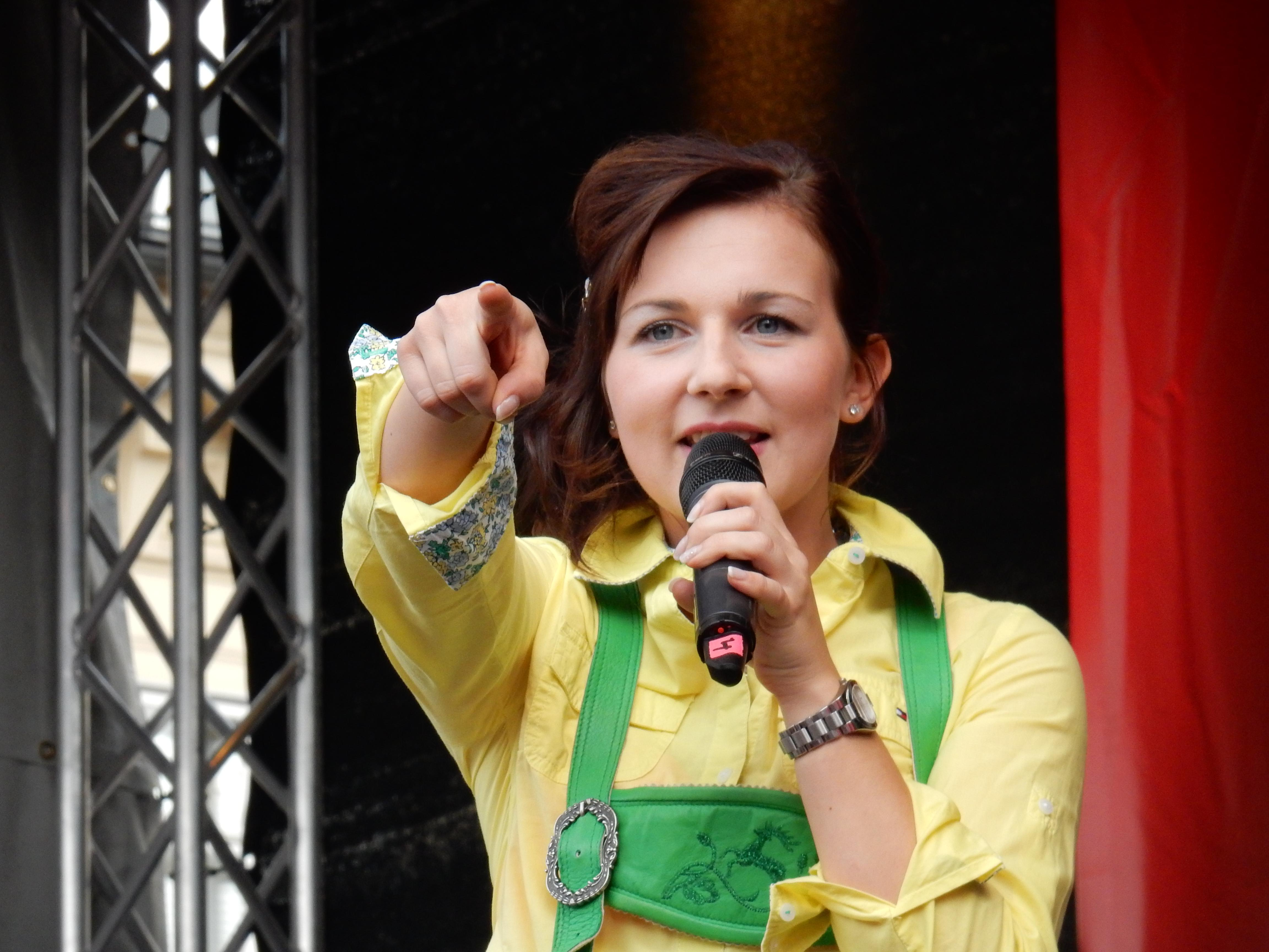 Romy live beim Linzer Kronefest 2015